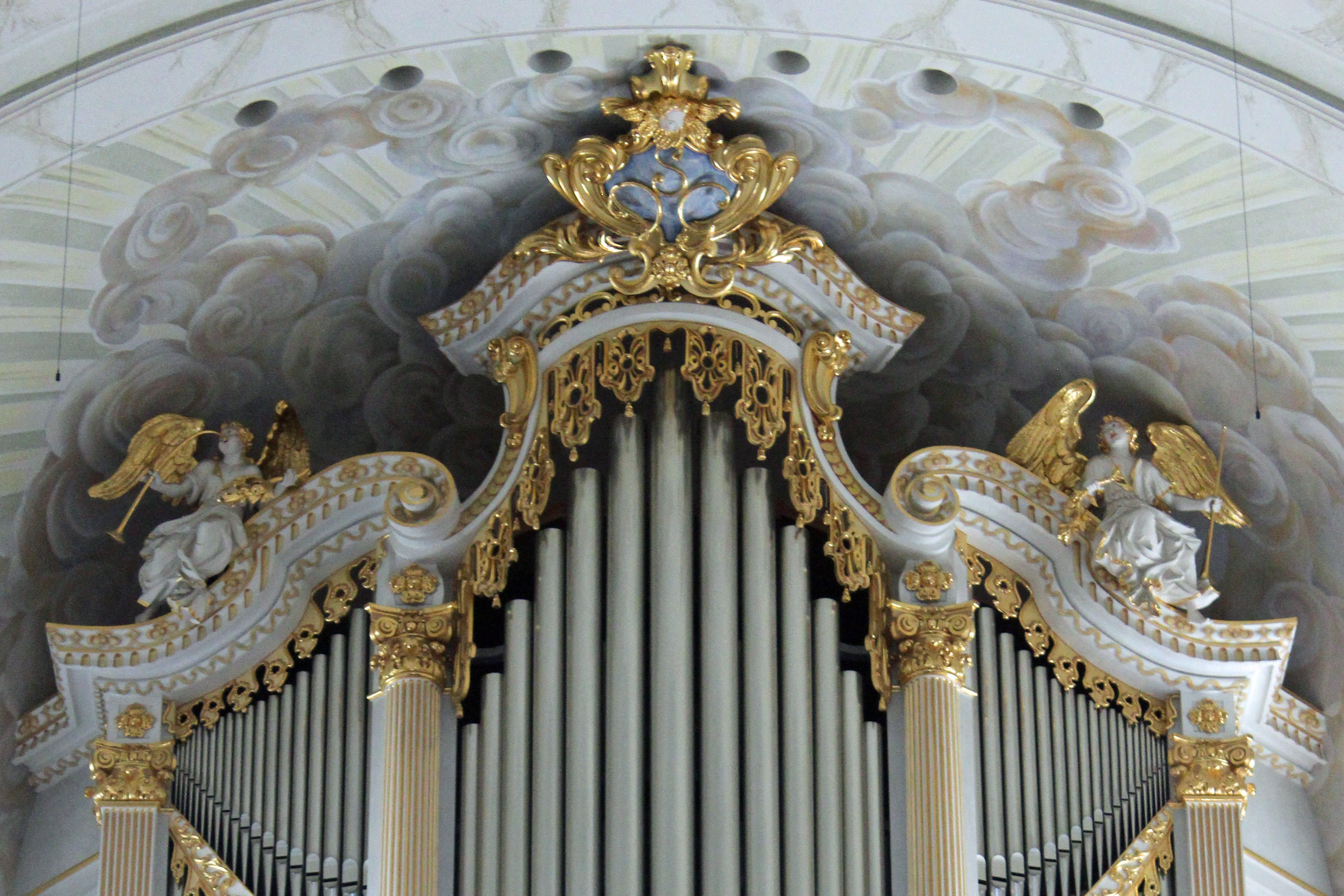 Oberer Teil des Orgelprospekts in der Dresdner Frauenkirche mit den beiden Posaunenengeln des Bildhauers Quirin Roth, die den beiden Dresdner Literaten Kurt Martens und Victor Klemperer gewidmet sind.